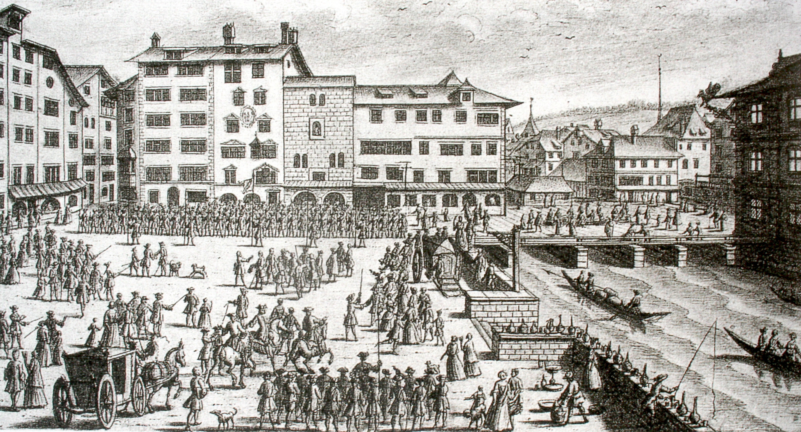 Weinplatz mit Haus zum Schwert um 1750/60. Darstellung von Johann Caspar Uehlinger